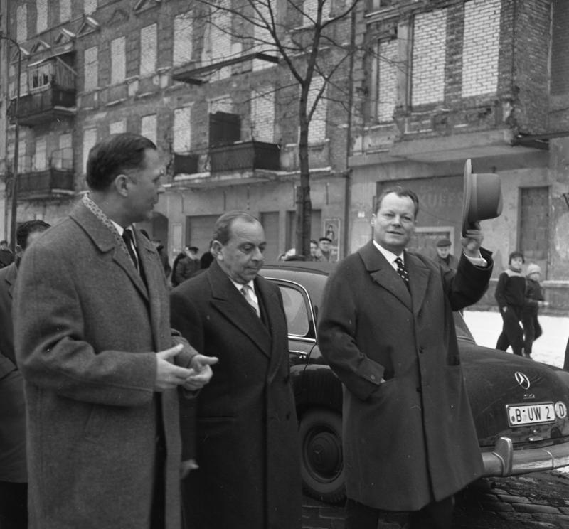 Staatsbesuch Zypern. Vizepräs. Kutchuk Stadtrundfahr, Bernauerstr. West-Berlin